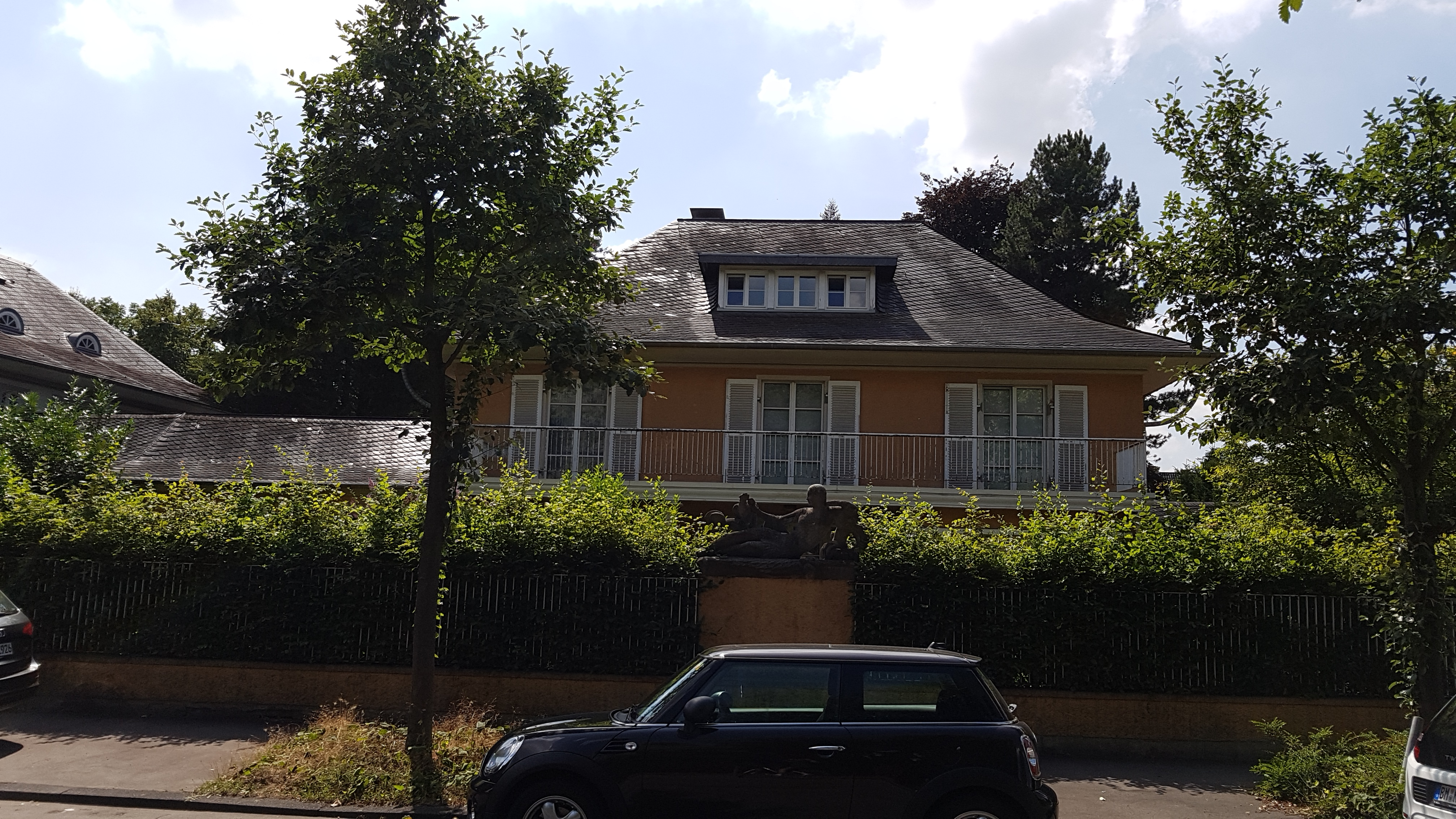 Baudenkmal